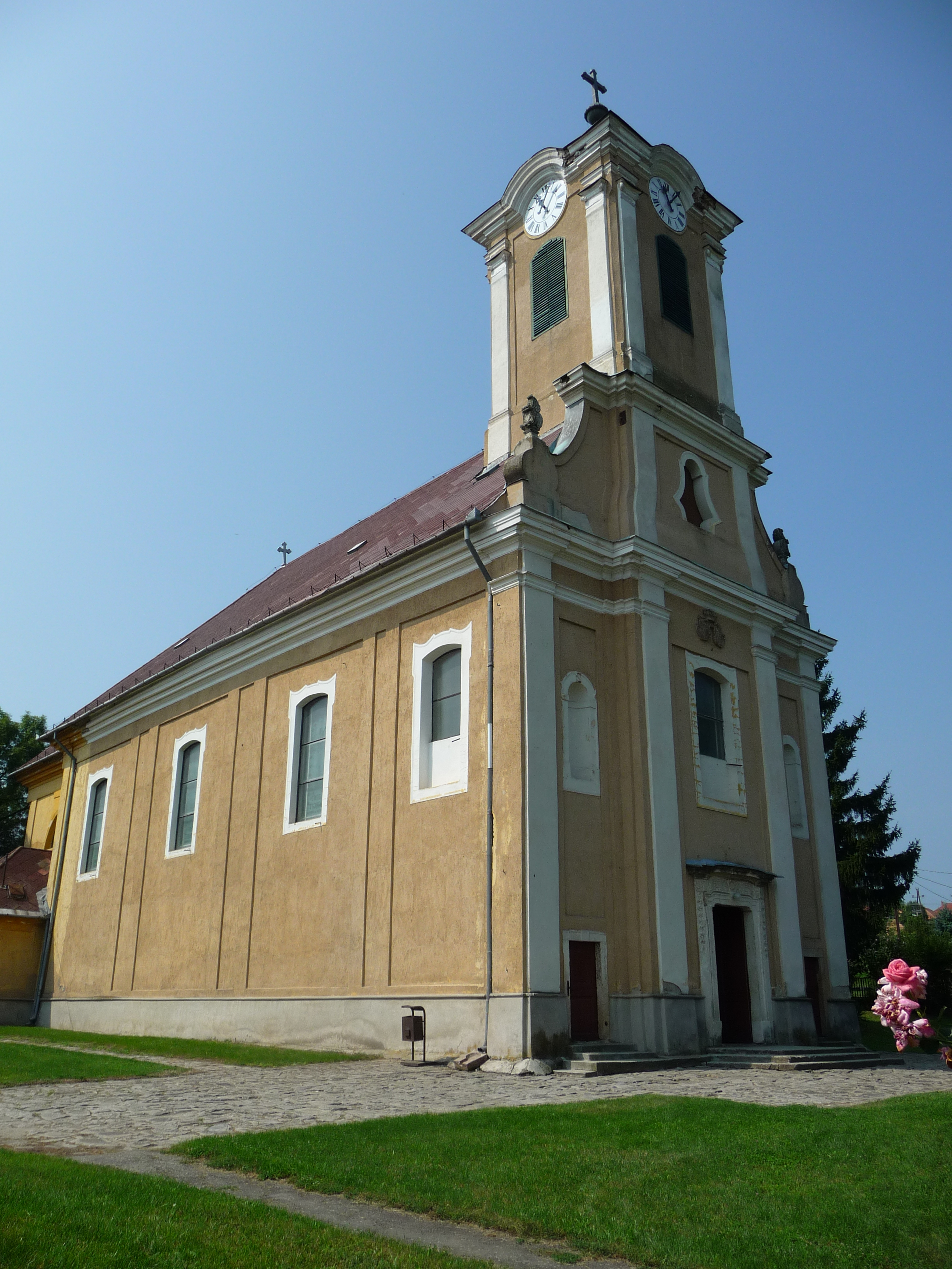 Római katolikus templom Bujákon